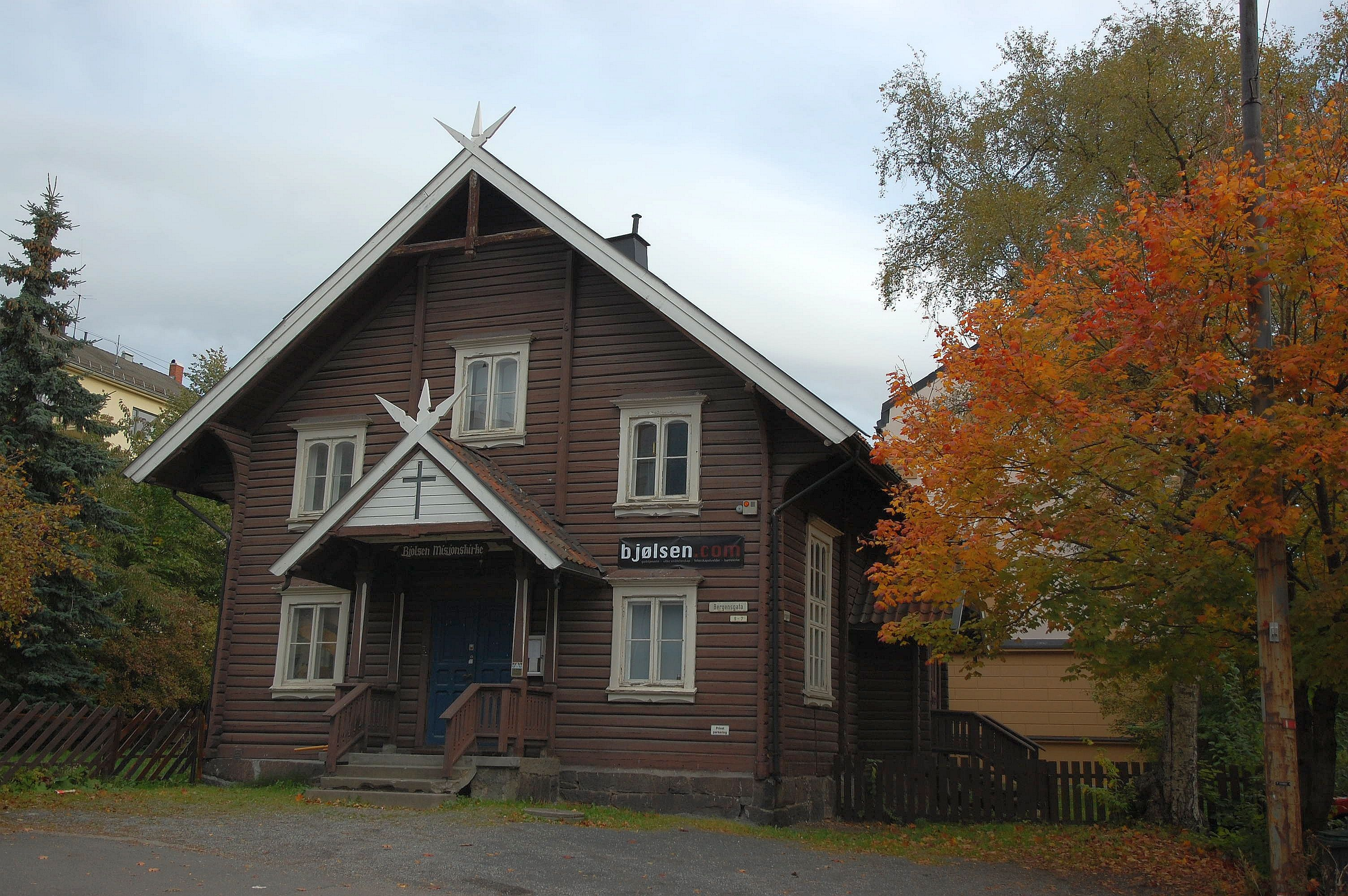 Bjølsen Misjonskirke i Bergensgata 7-9, Oslo